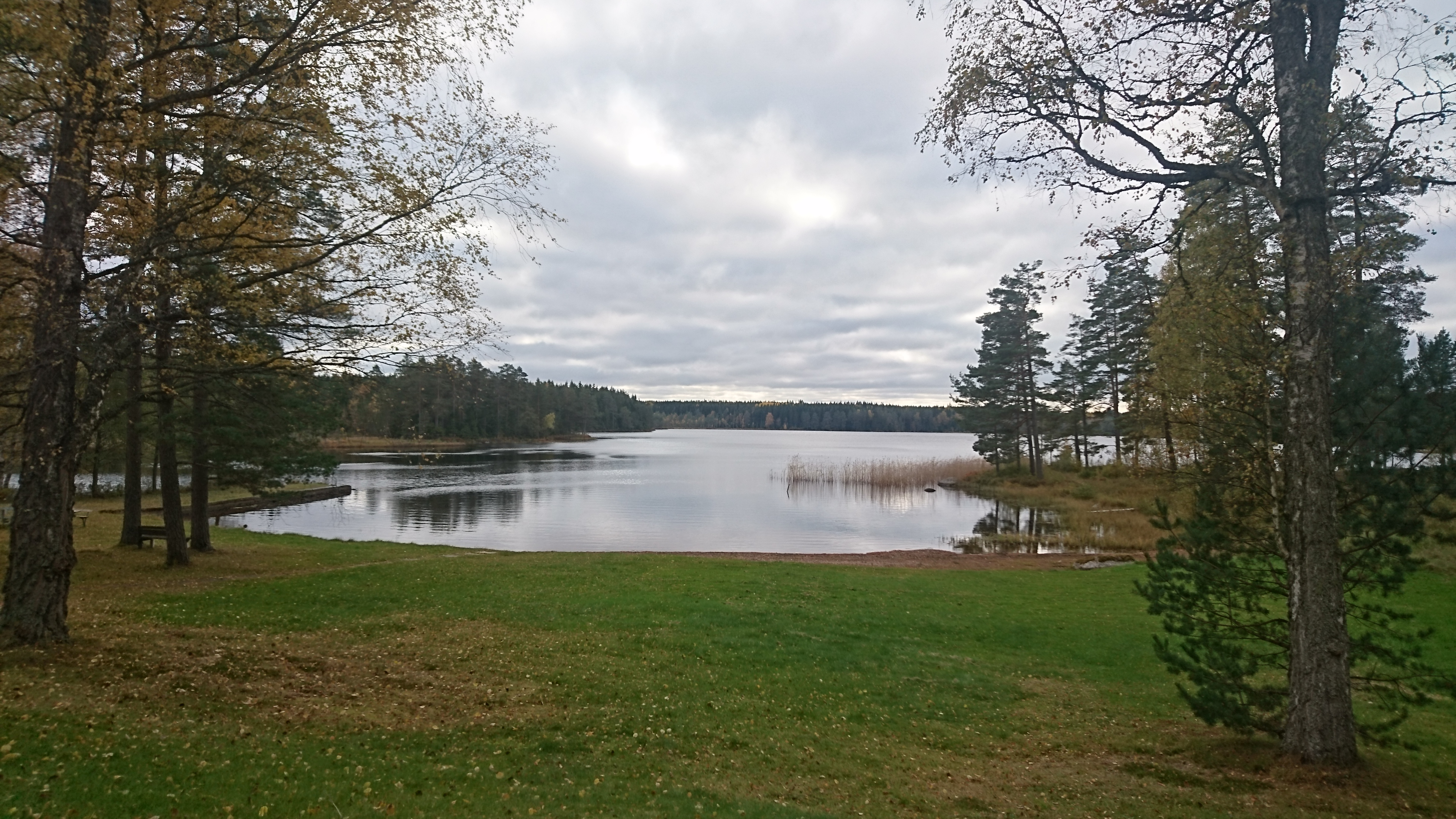 Bild från badplatsen vid Narven utanför Hova.